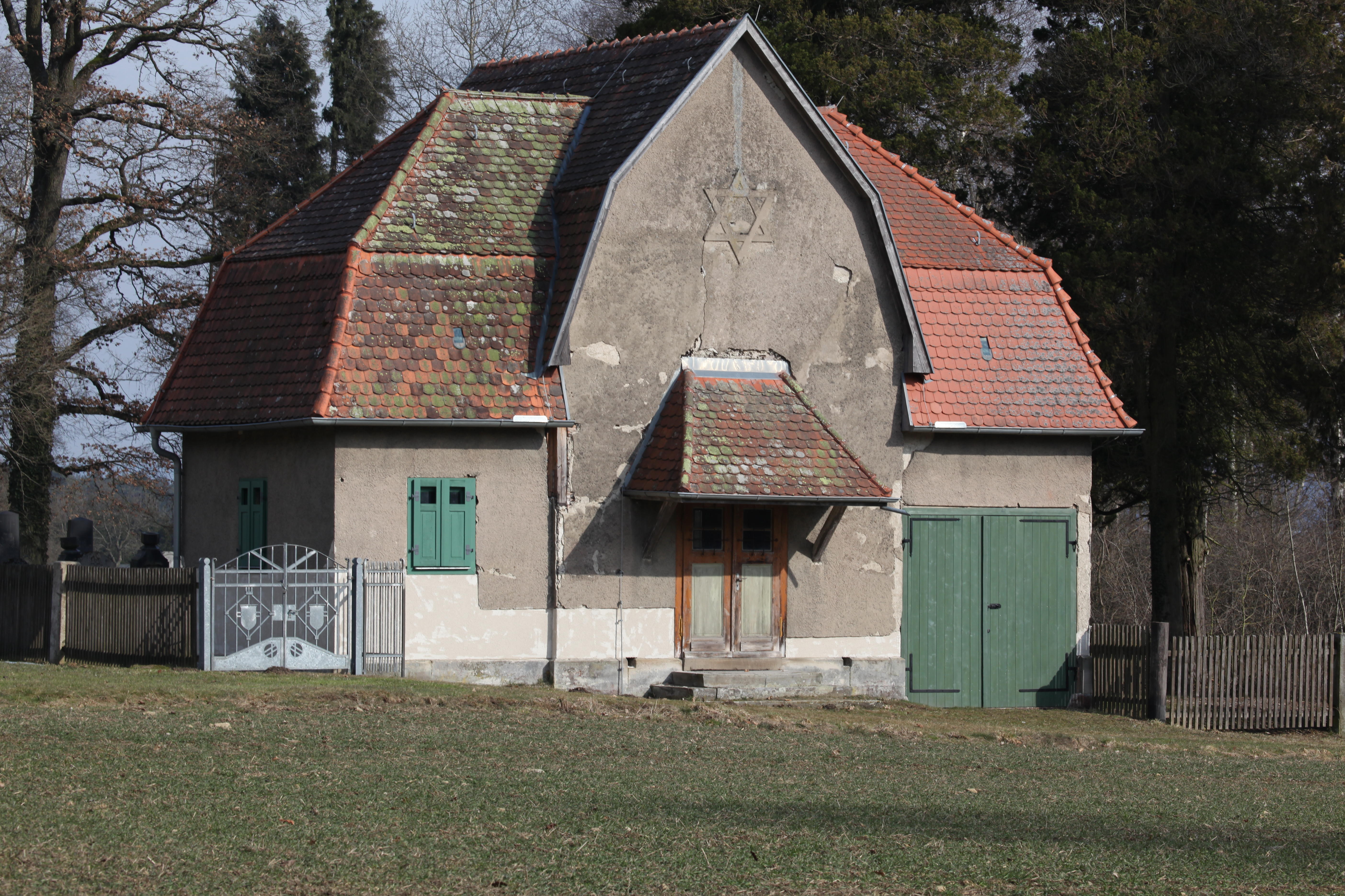 Taharahaus des Jüdischen Friedhofs Weitersroda, OT von Hildburghausen